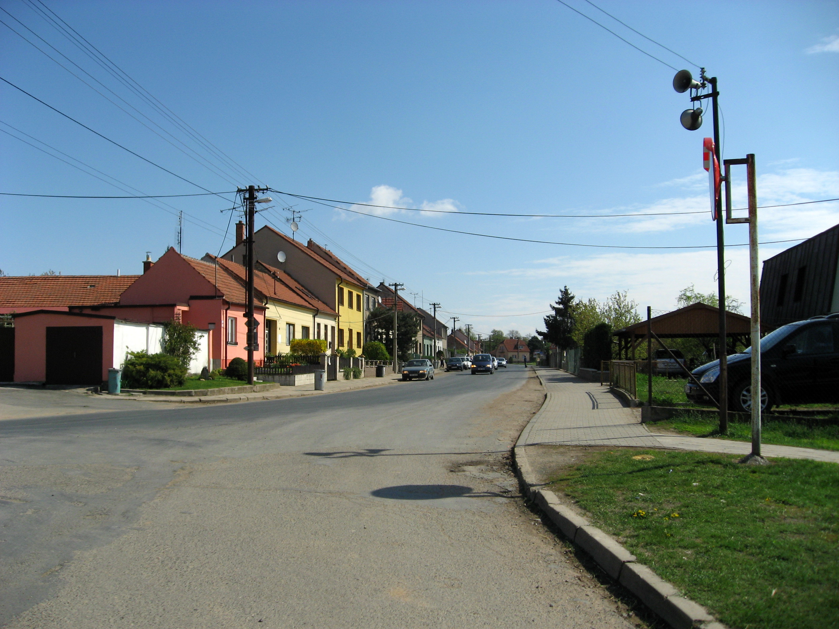 Moravany